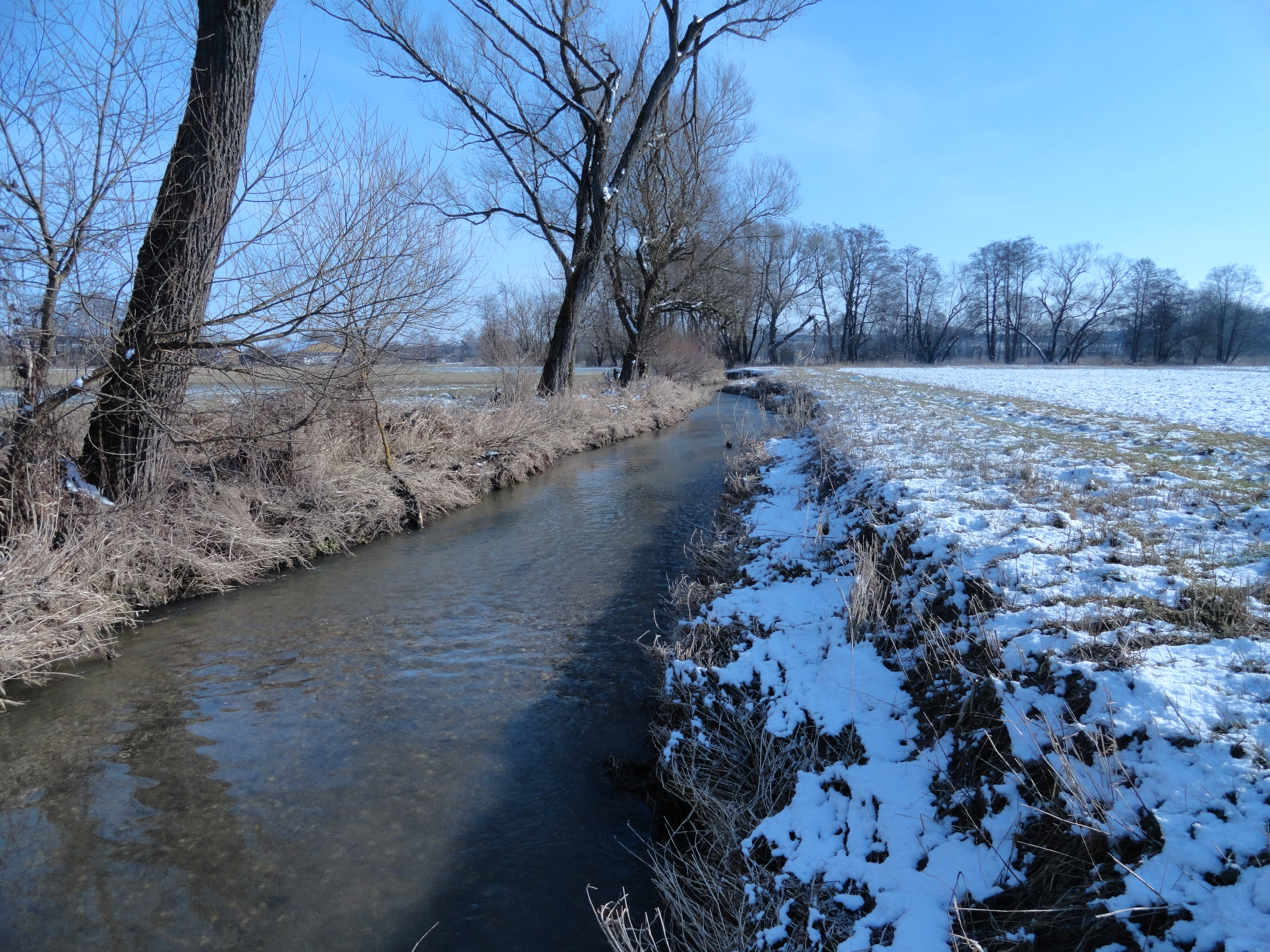 Hartlaber bei Haidenkofen